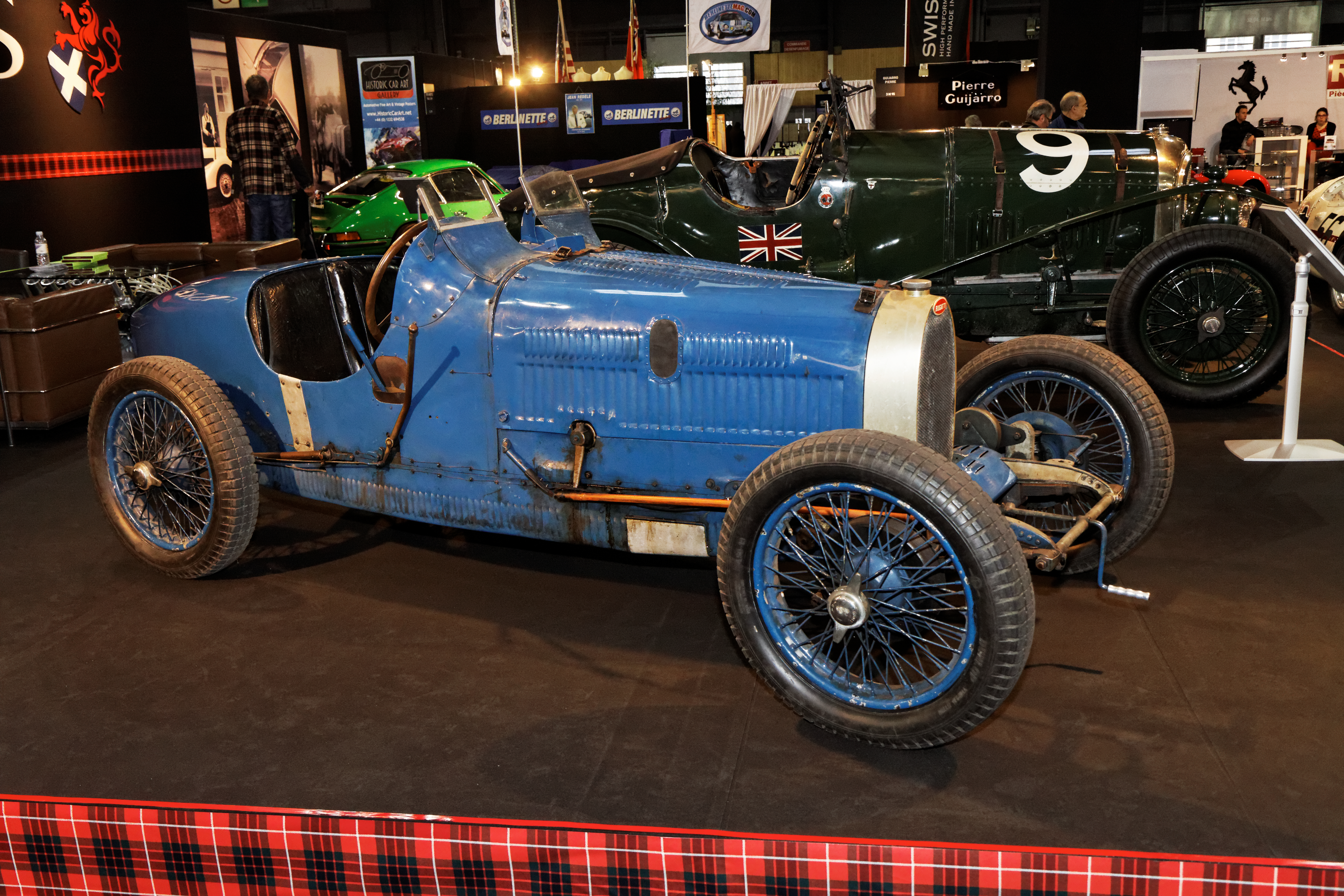 Une Bugatti type 37A présentée lors du salon Retromobile 2013.